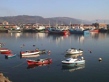 Barcos en Colindres (Cantabria)